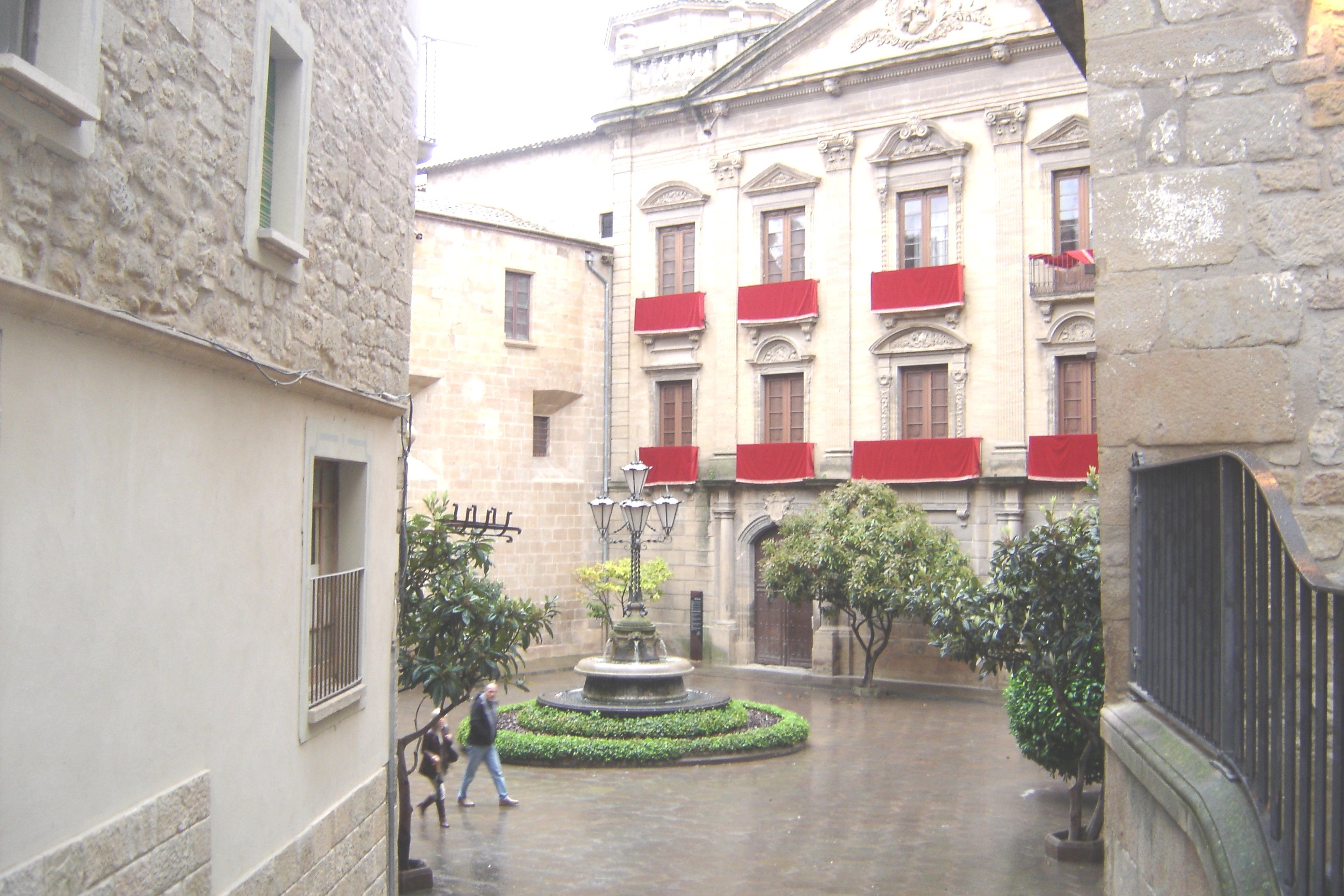 La font de la plaça del Palau Episcopal, a Solsona (Solsonès)